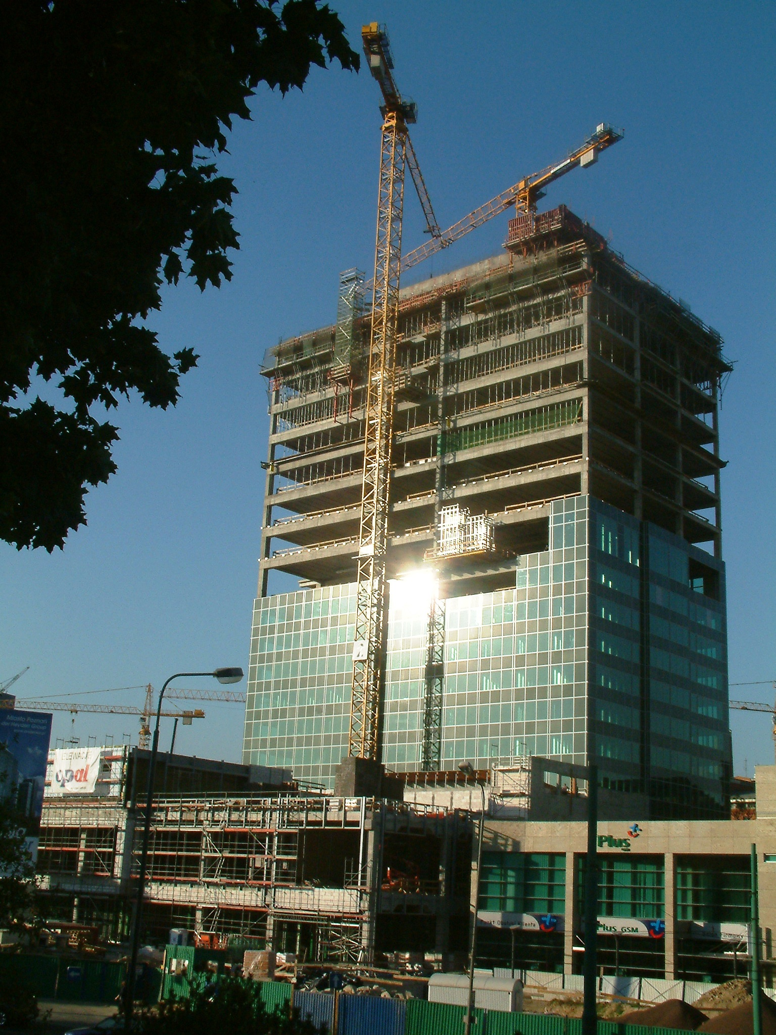 Andersia Tower in Poznań